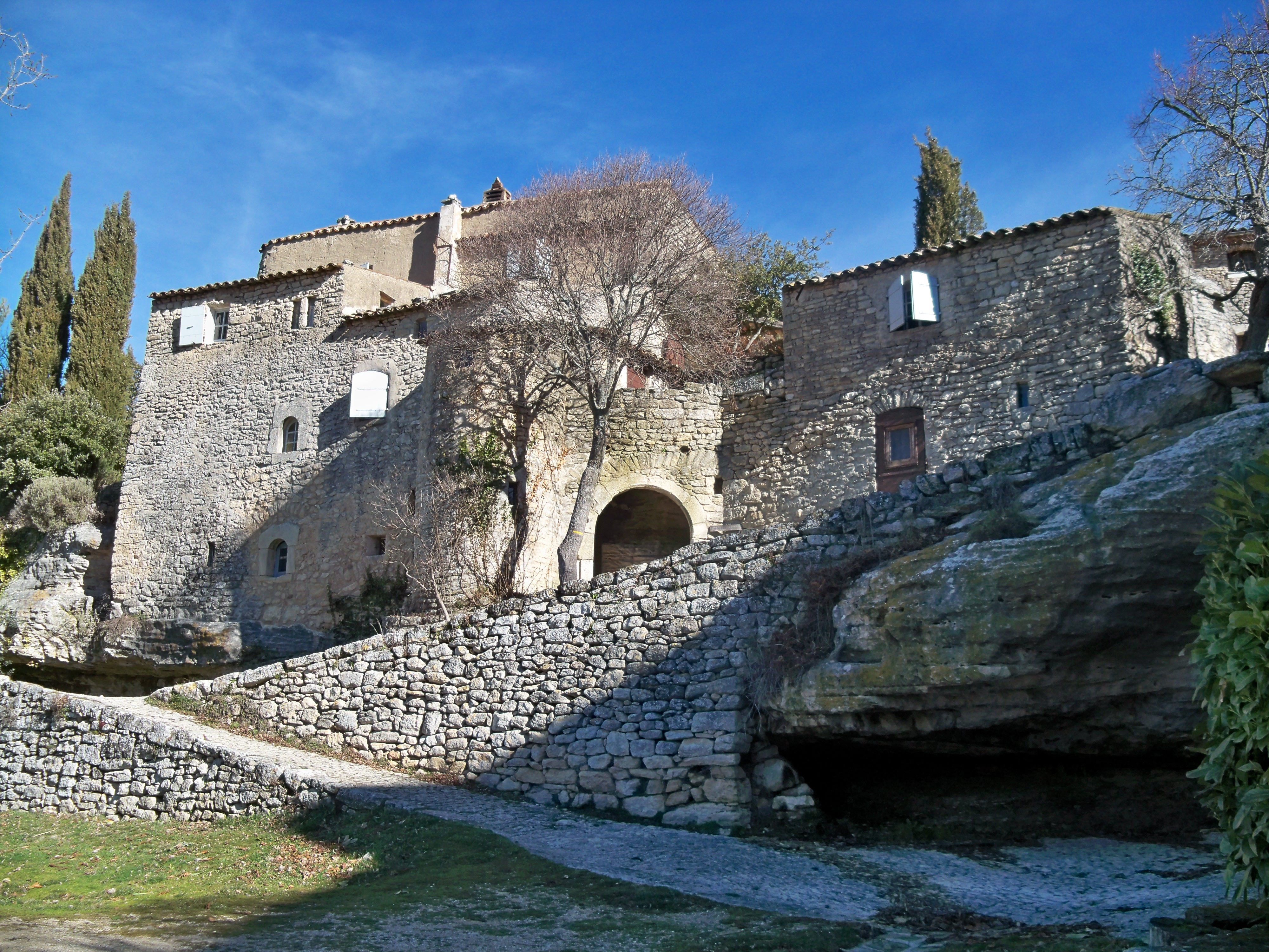 Sivergues, Vaucluse